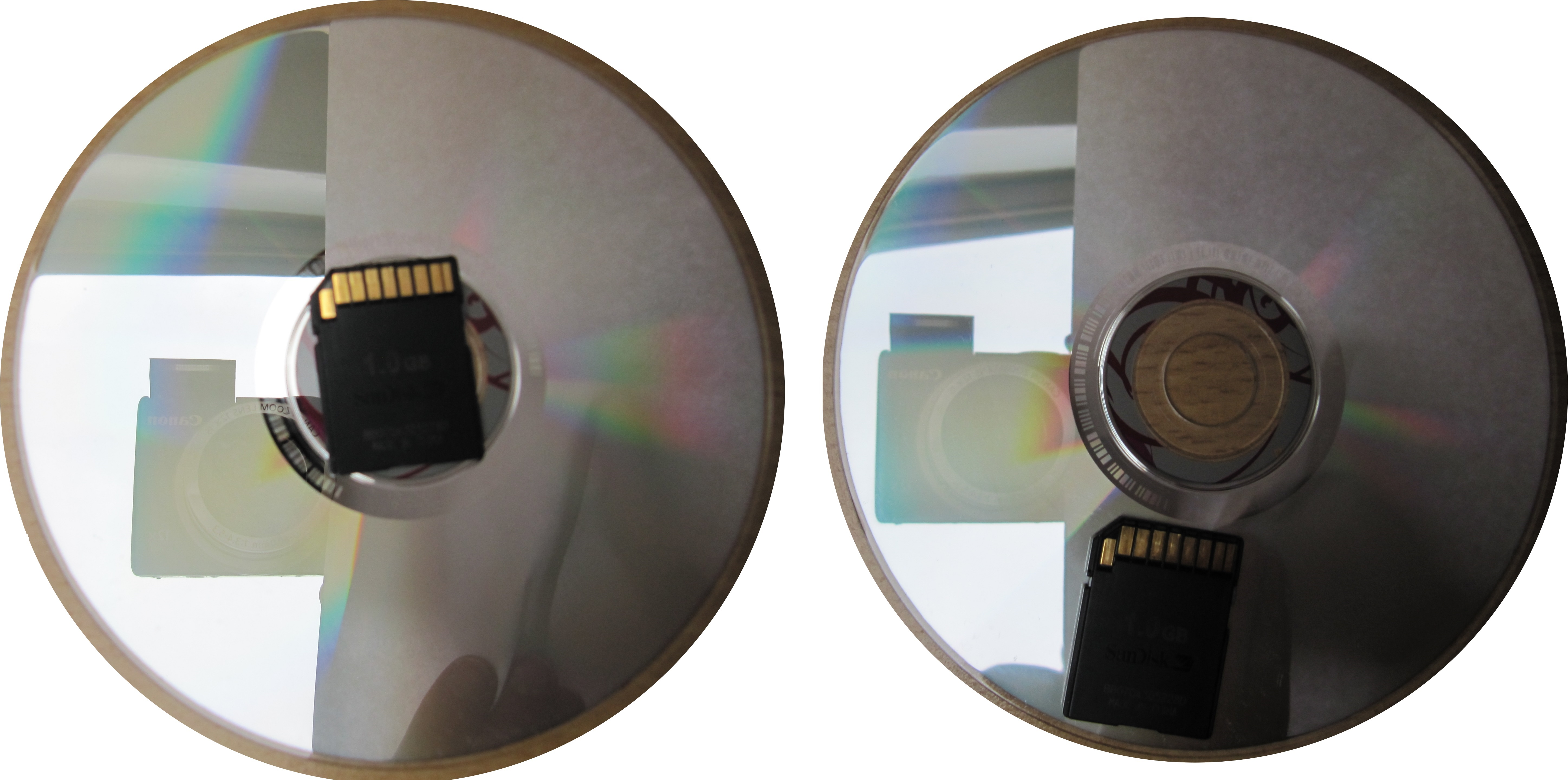 La carte SD au centre d'un CD de 12 cm de diamètre. En orange : connectique SD. Et, la carte SD ne dépasse pas la zone des données du CD.